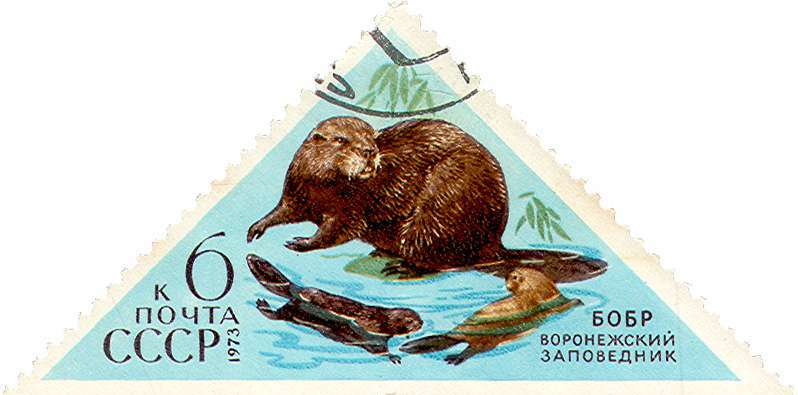 Марка. Бобр. Воронежский заповедник 1973